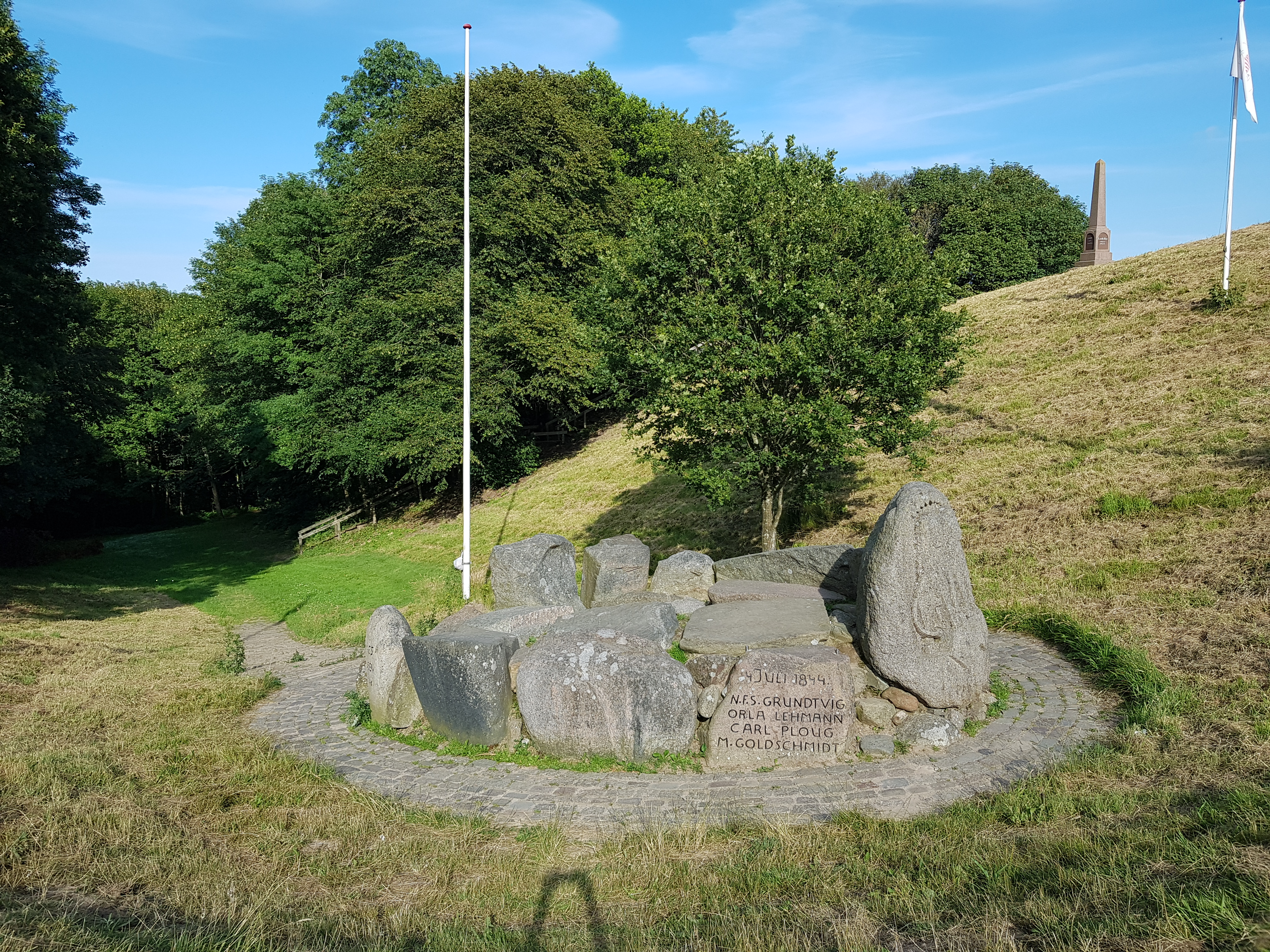 Talerstolen set fra nordsiden